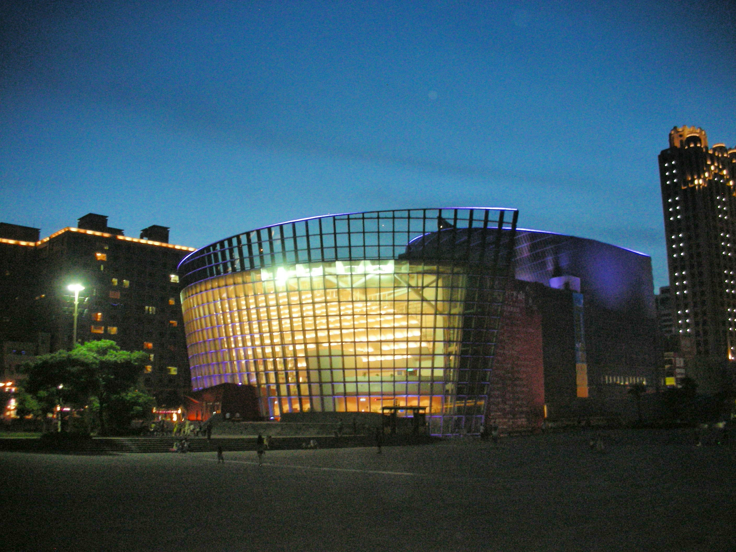 桃園縣展演中心 (夜景)